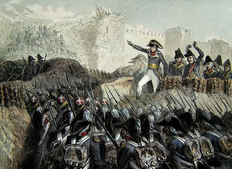 حصار عكا من قبل القوات الفرنسية بقيادة نابليون بونابرت 1799 Siege of Acre (1799)